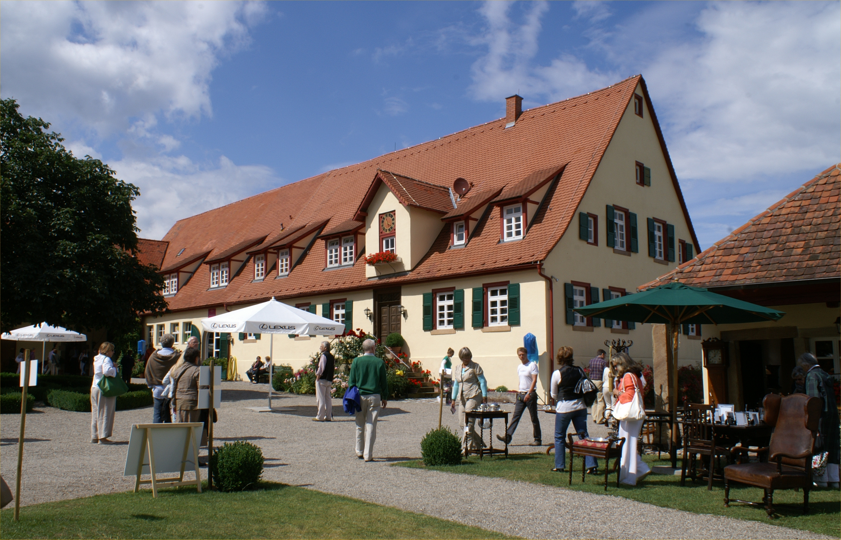 Das Gut Schwarzerdhof im Kraichgau wurde in den Jahren 1795 bis 1817 erbaut. Es befindet sich in Privatbesitz der Familie Baron von Papius. Die historische Anlage kann für private und geschäftliche Veranstaltungen gemietet werden.